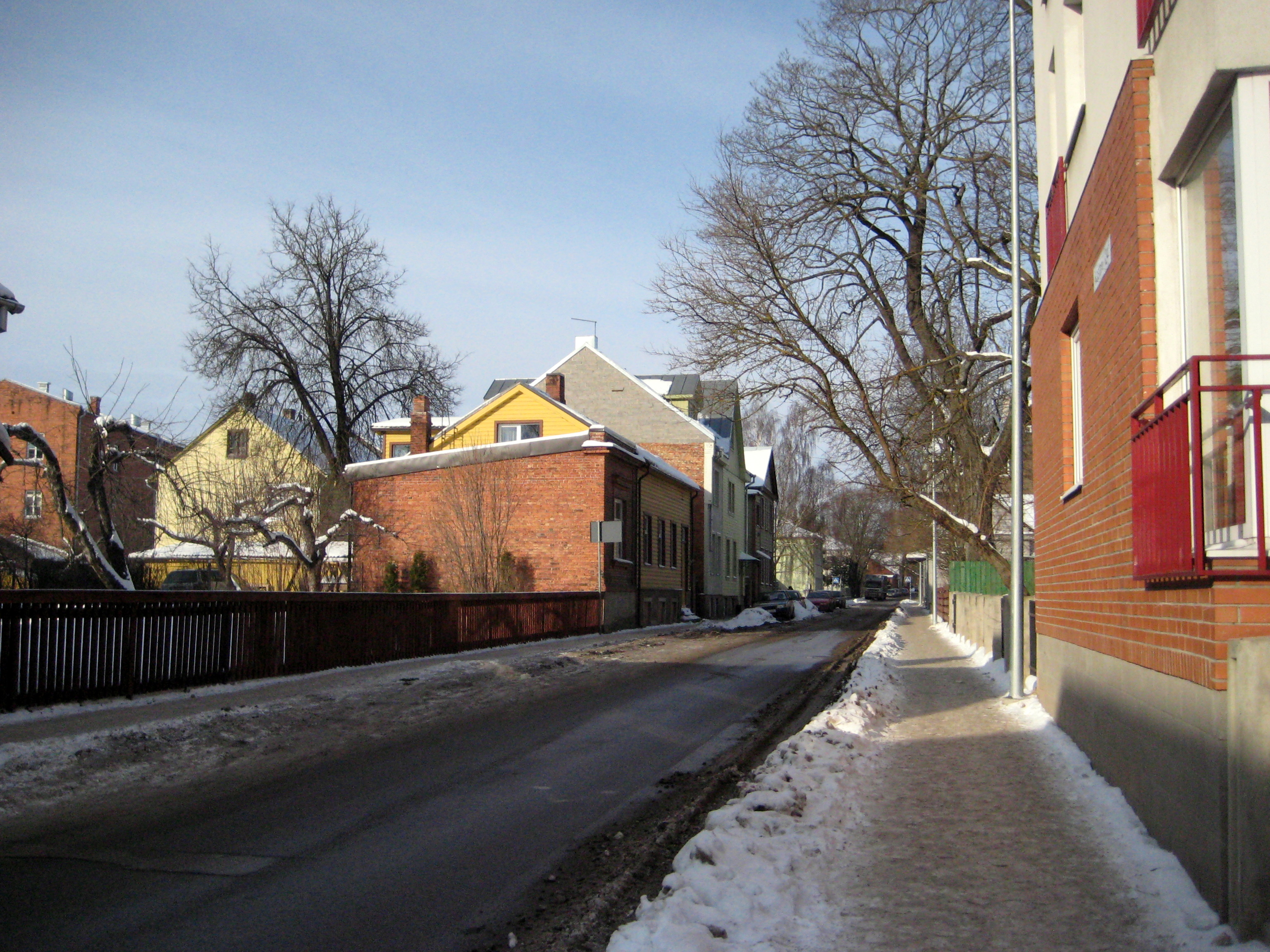 Kastani tänav Vanemuise ristmikult põhja poole, Tartu